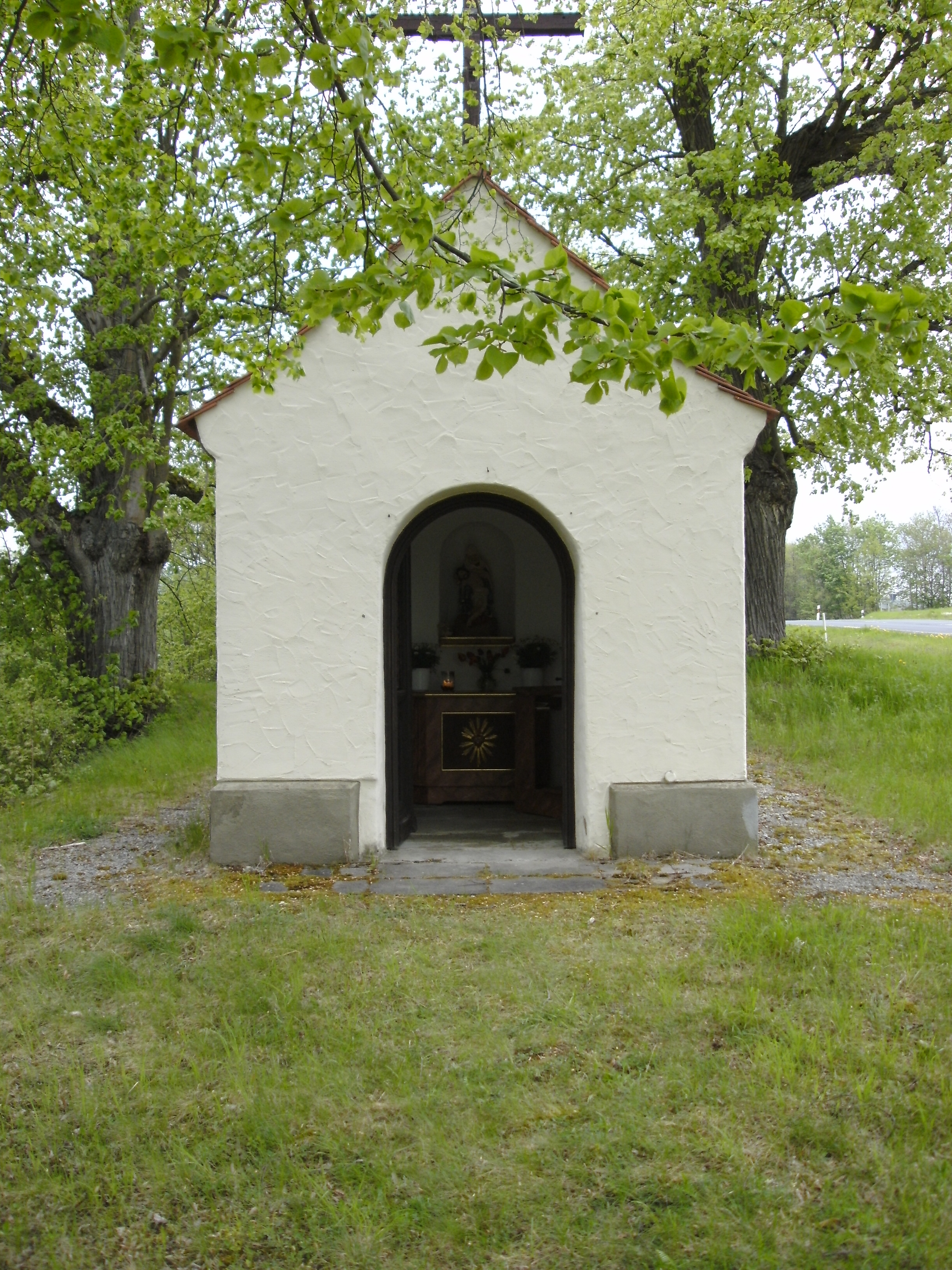 Die Armenseelenkapelle im Frühjahr mit offener Tür